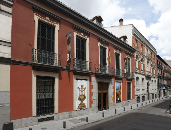 Fachada principal del Museo del Romanticismo, Madrid.